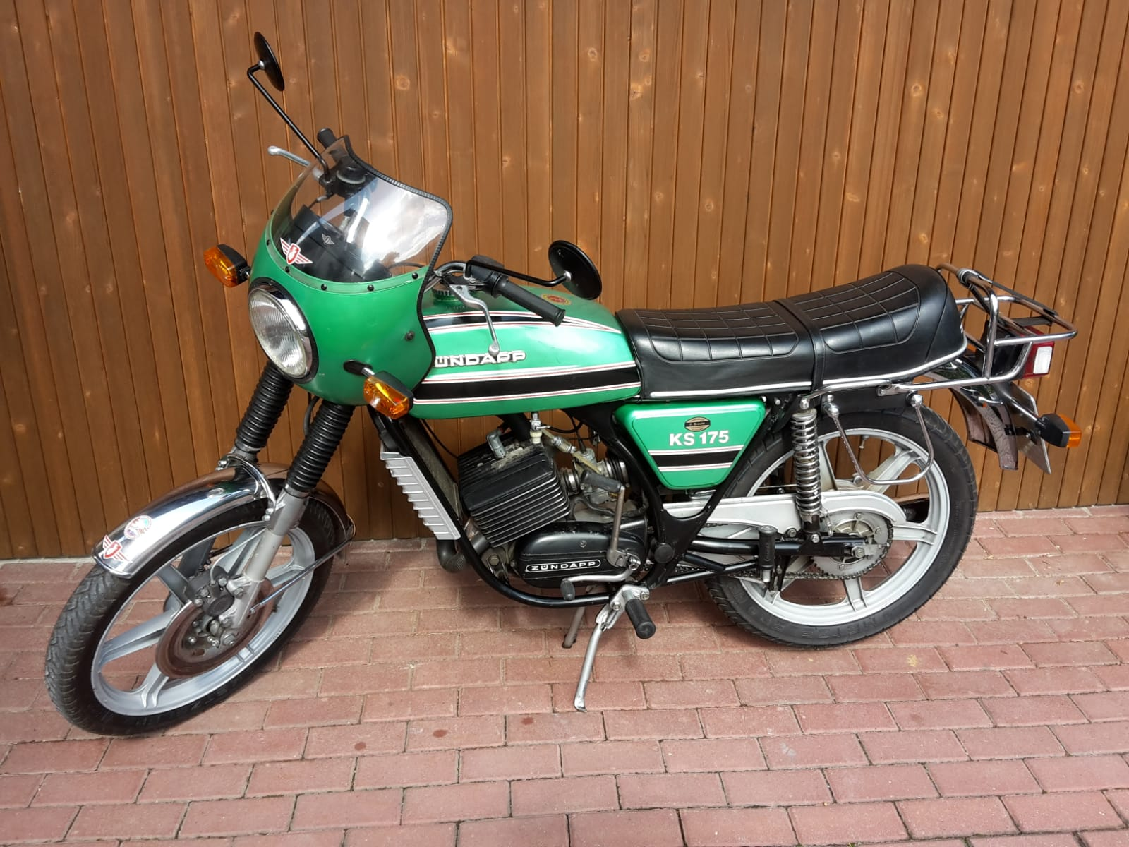 Zündapp Motorrad, Modell KS 175 in Metallic-Grün, Fahrzeugtyp 521-50, 2-Takt Motor, 13kW, 163 cm3 Hubraum